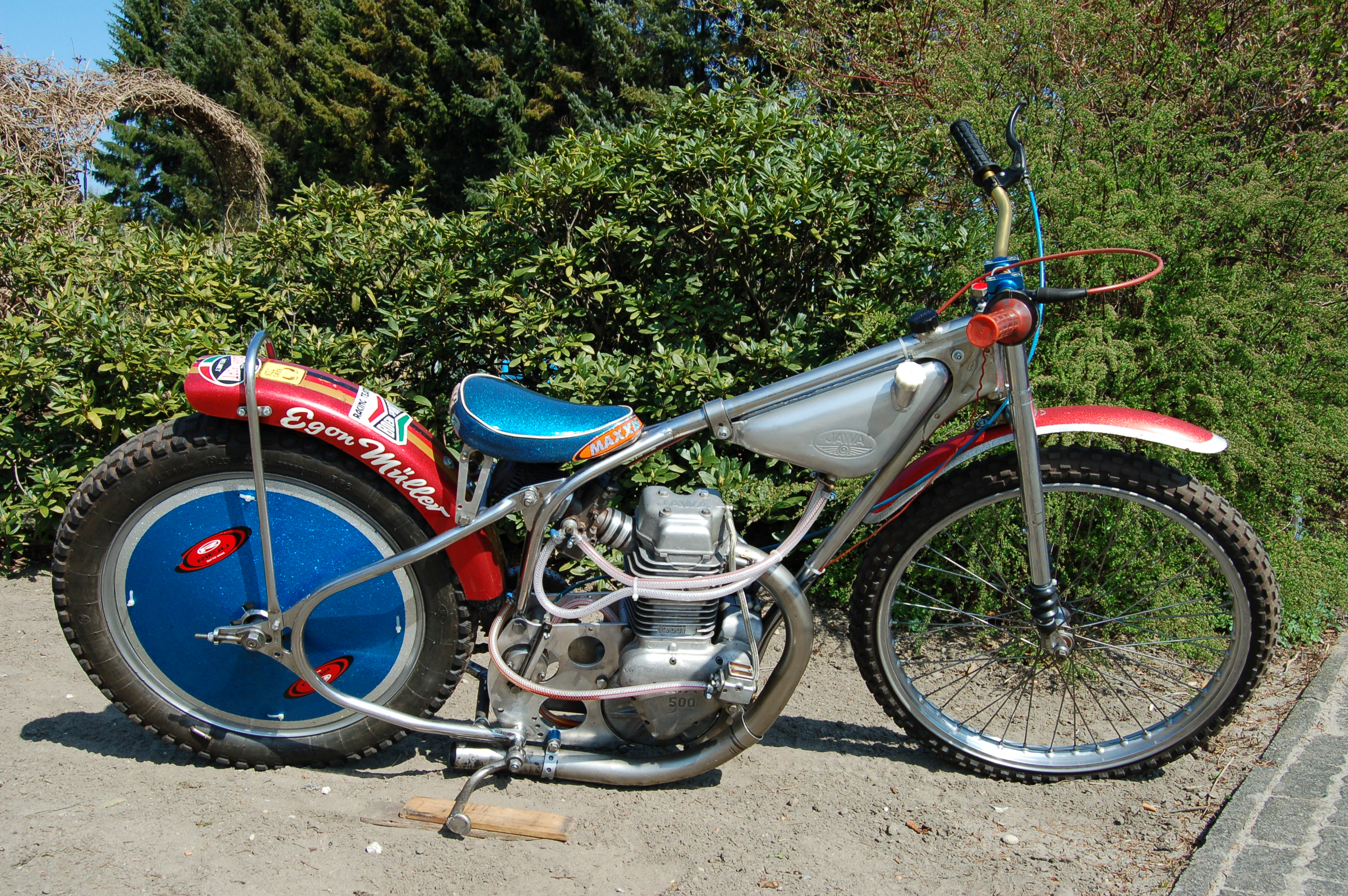 Jawa Speedway Maschine, 500ccm, 2 Ventiler, 4-Takt-Motor mir Dell'Orto Vergaser, ca. 60 PS.